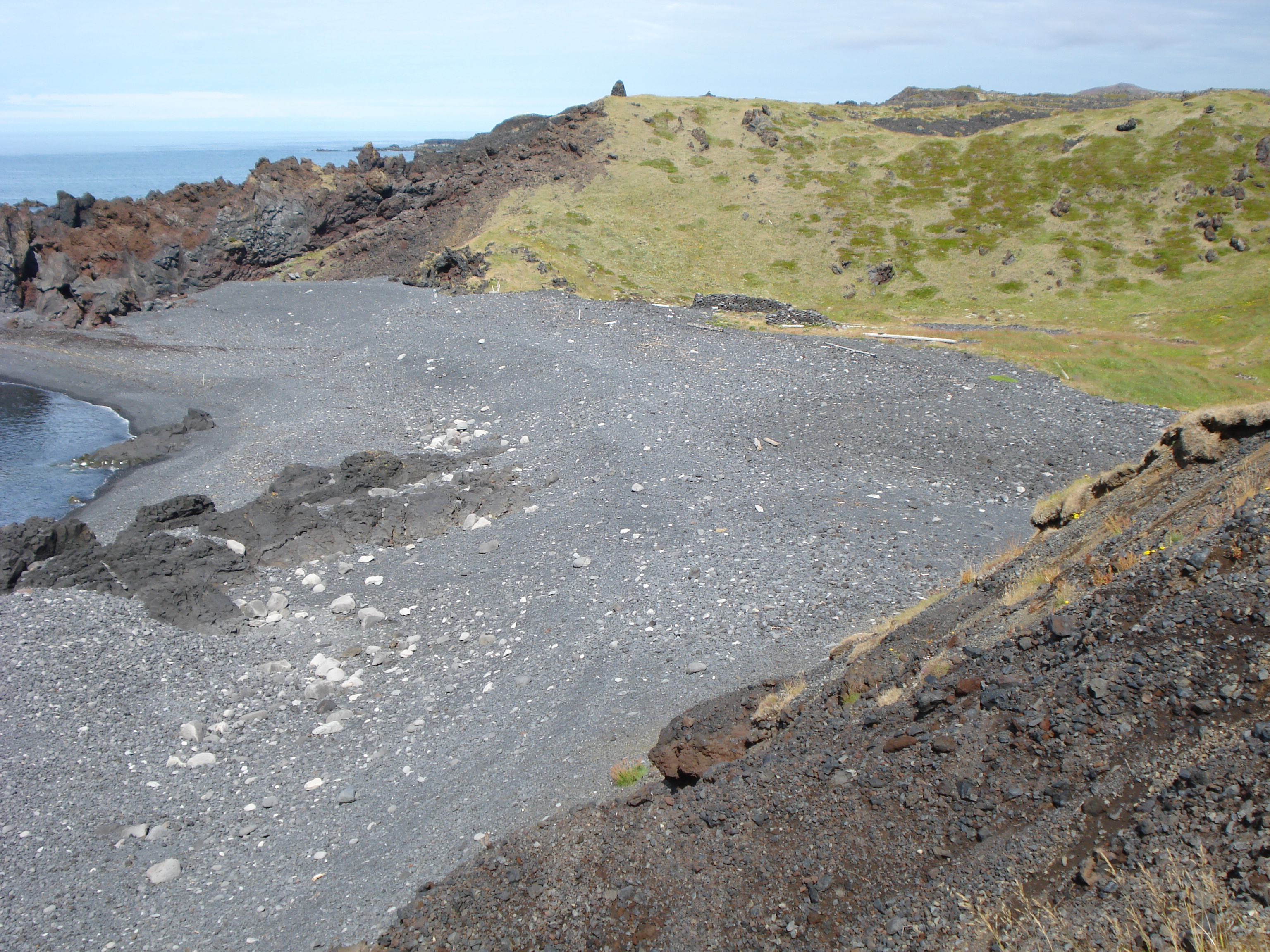 Dritvík, Iceland